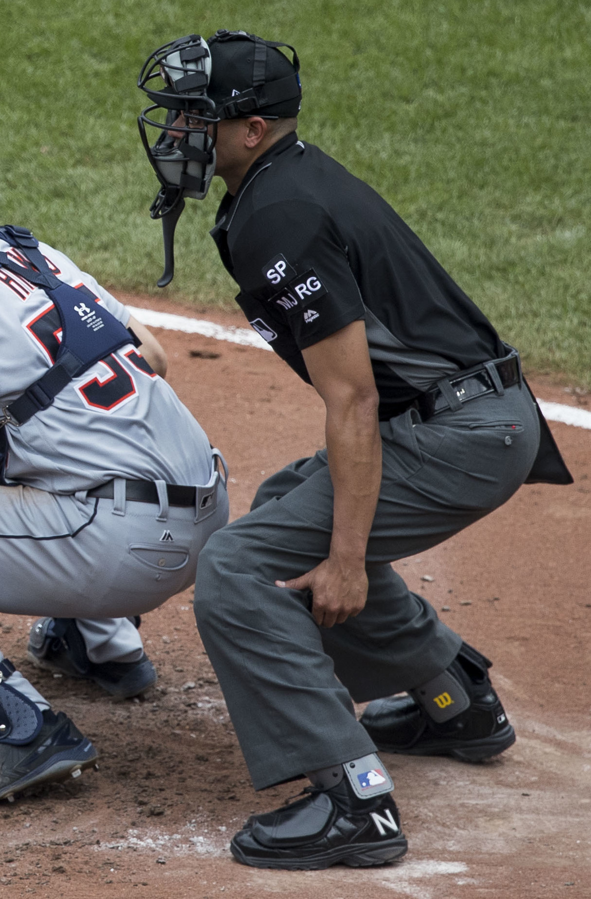 Tigers at Orioles 8/6/17